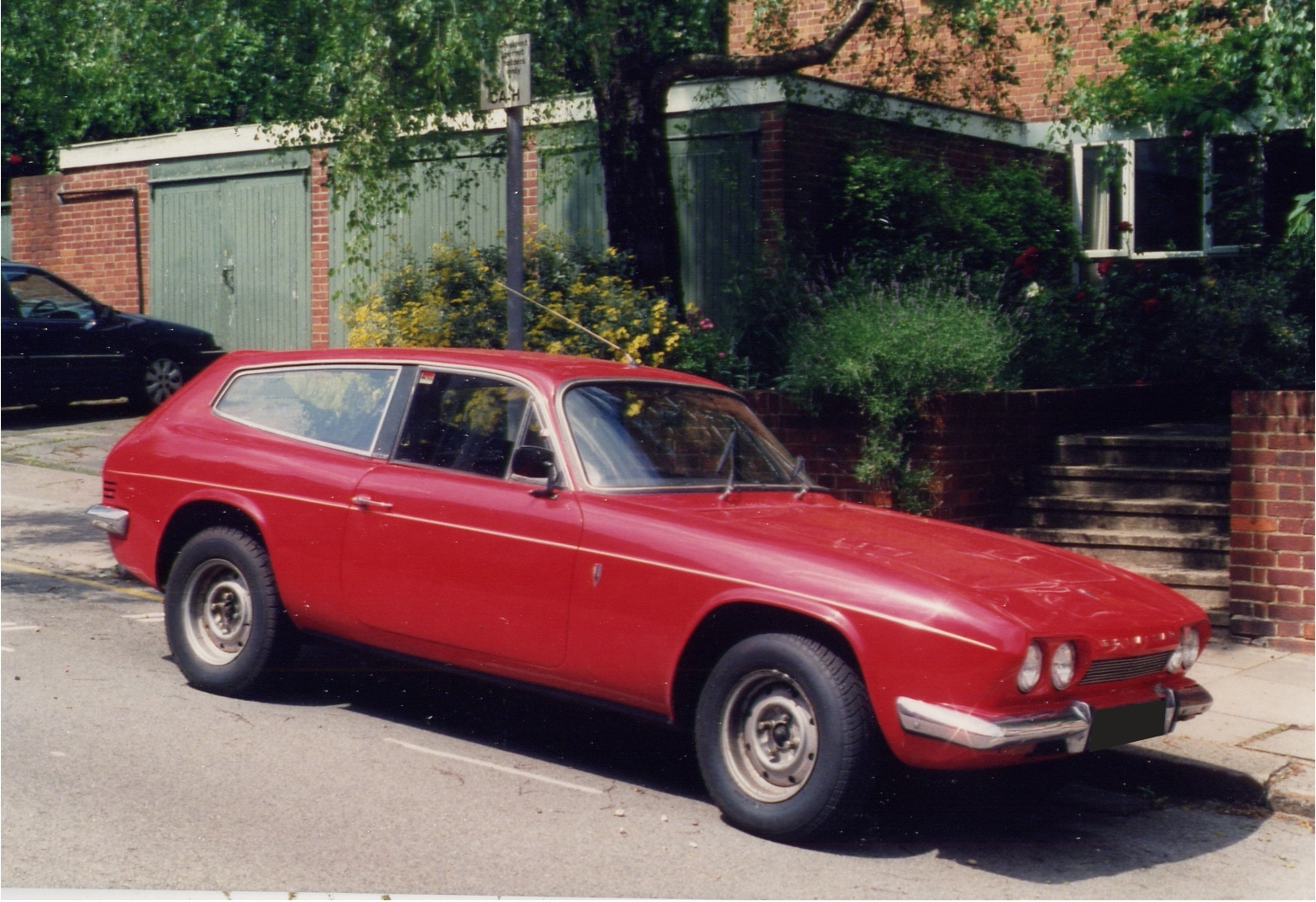 Reliant Scimitar SE5